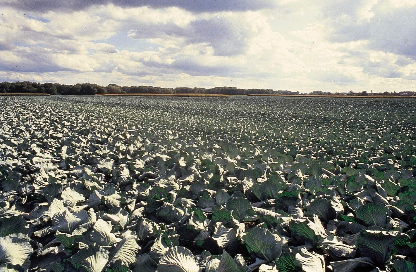 choucroute